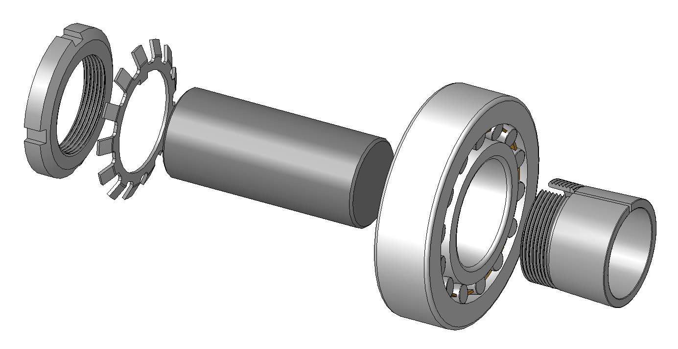 de: Befestigung eines Wälzlagers mit kegligem Innendurchmesser auf einer zylindrischen Achse/Welle mittels Spannhülse in Explosionsdarstellung. Von links nach rechts: Nutmutter (DIN981) Sicherungsblech (DIN5406) Achse/Welle Waelzlager (hier: Pendelrollenlager) Spannhuelse (DIN5415)